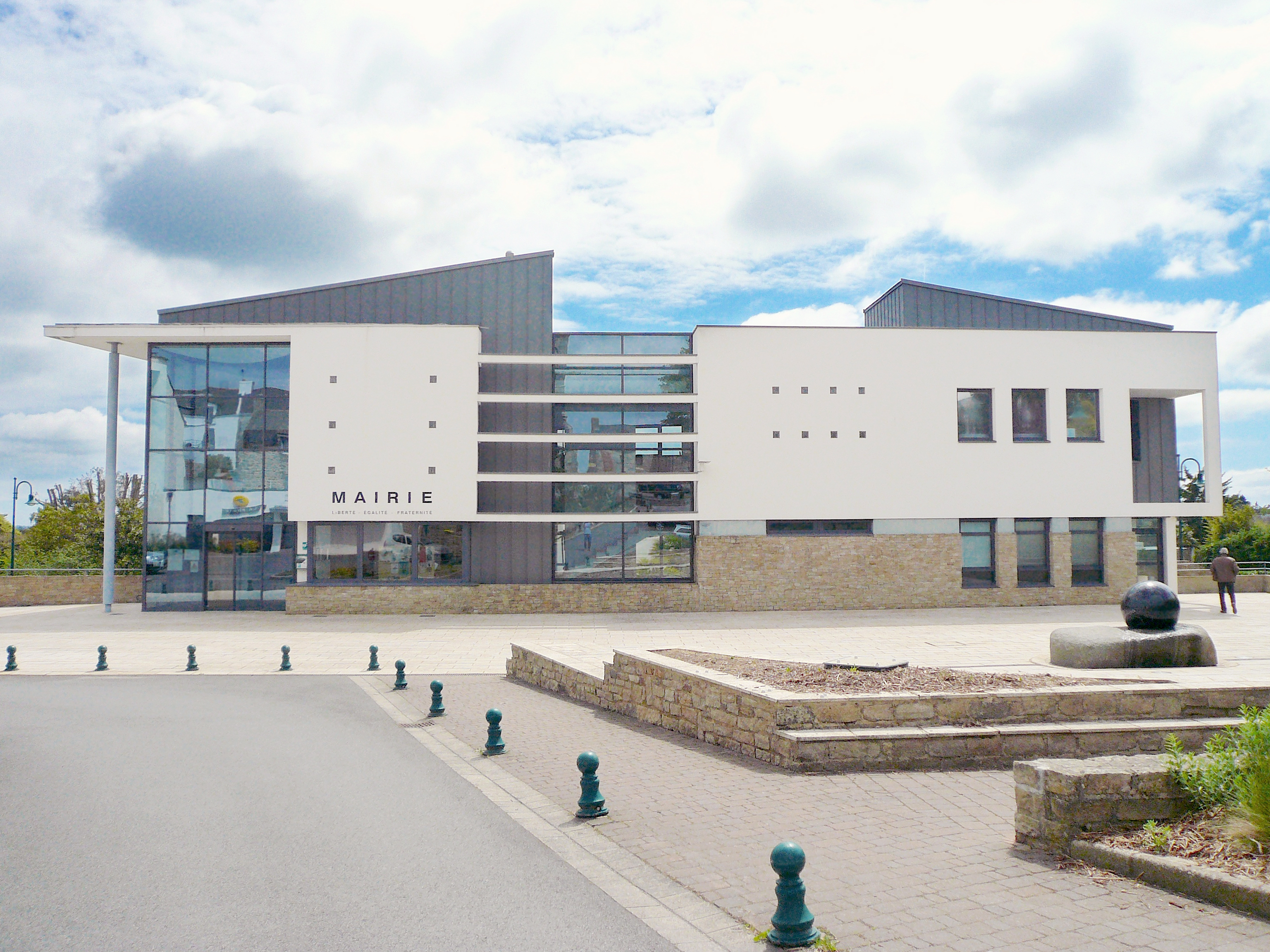 La mairie de Baden près du golfe du Morbihan.